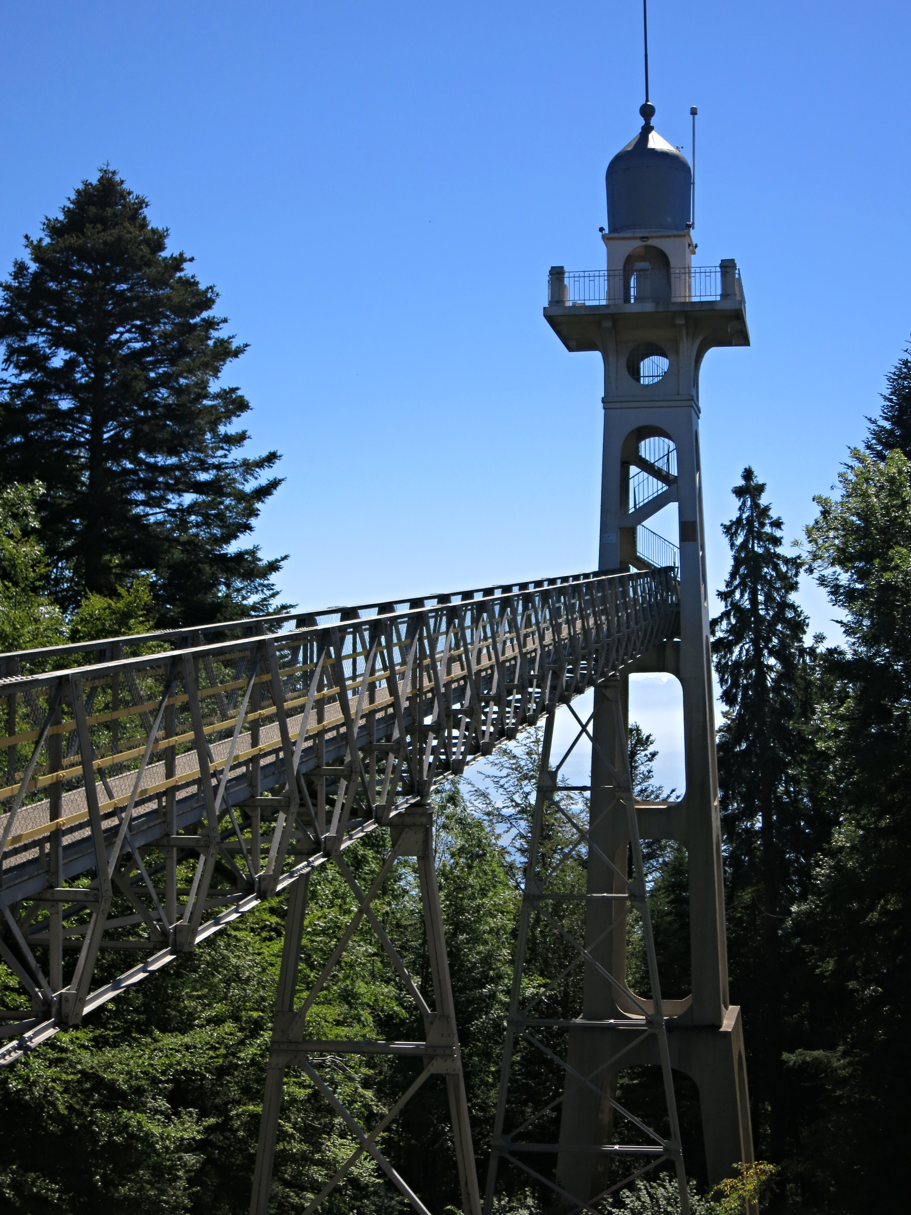 Chaumontturm